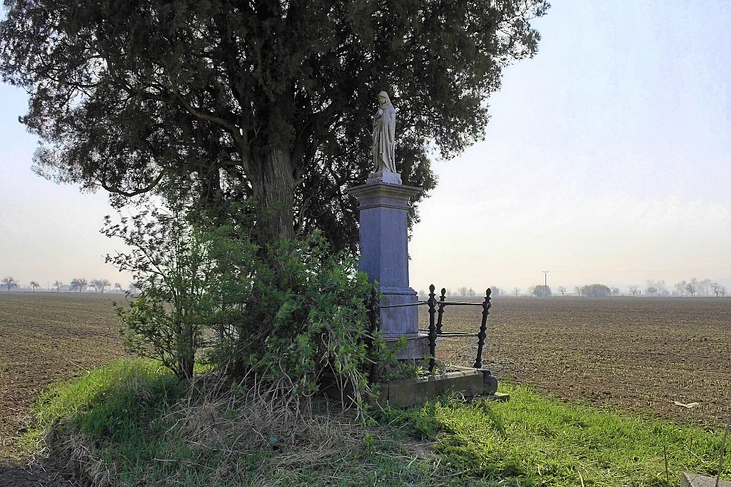 Socha Panny Marie v poli u Martinic.